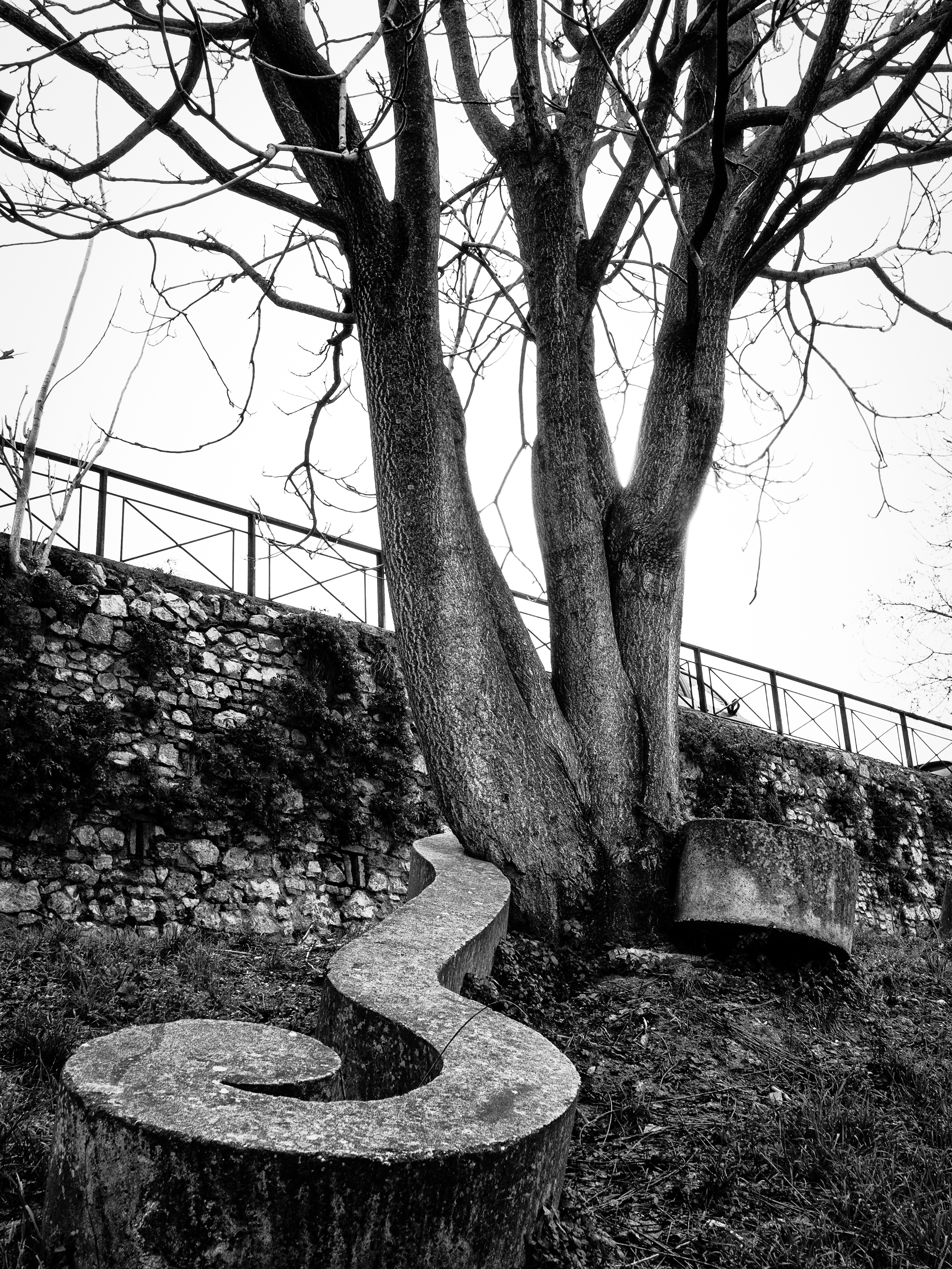 Giardini "Le passeggiate" This is a photo of a monument which is part of cultural heritage of Italy.